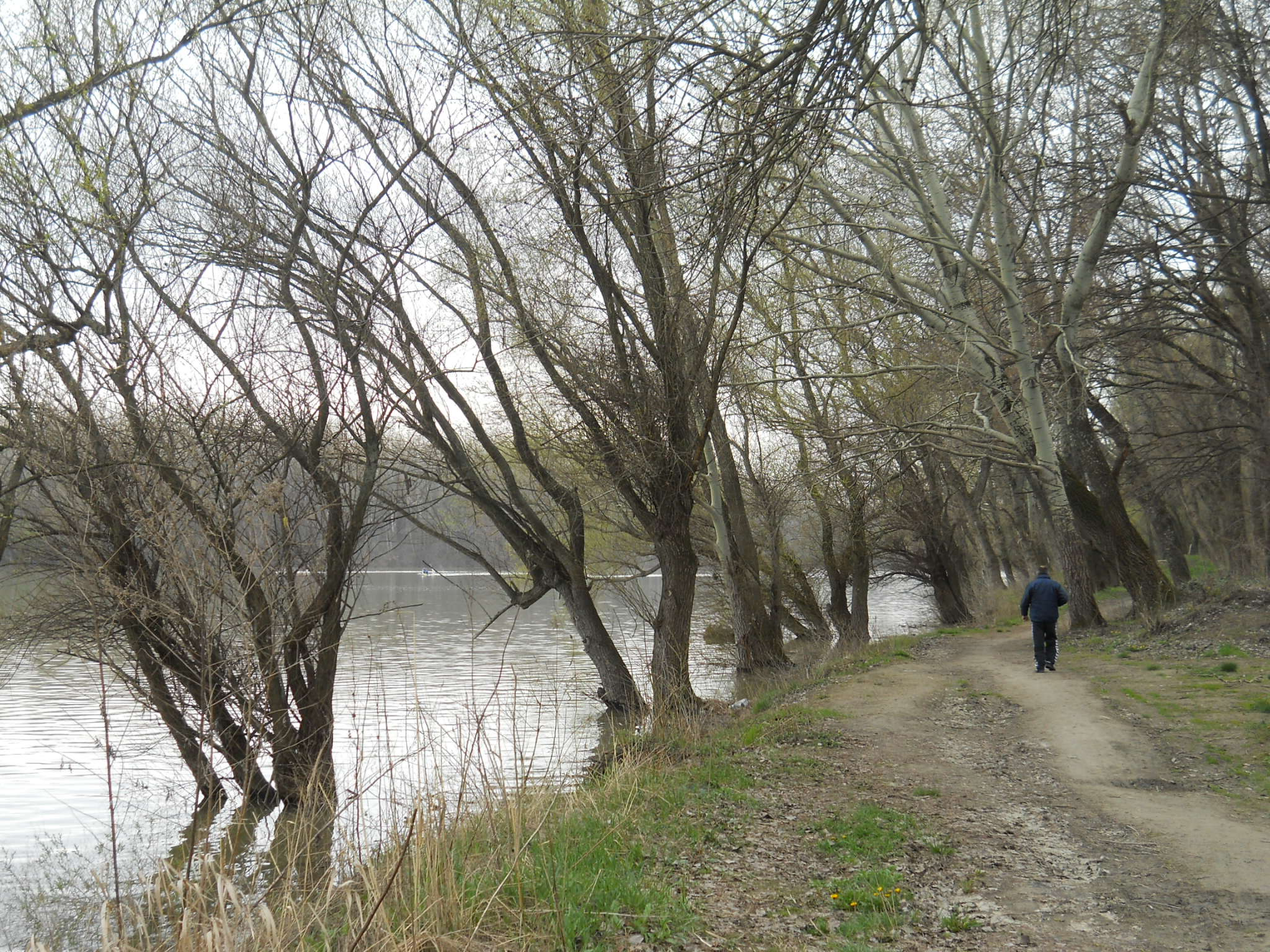 Palánka - Tikvara-part